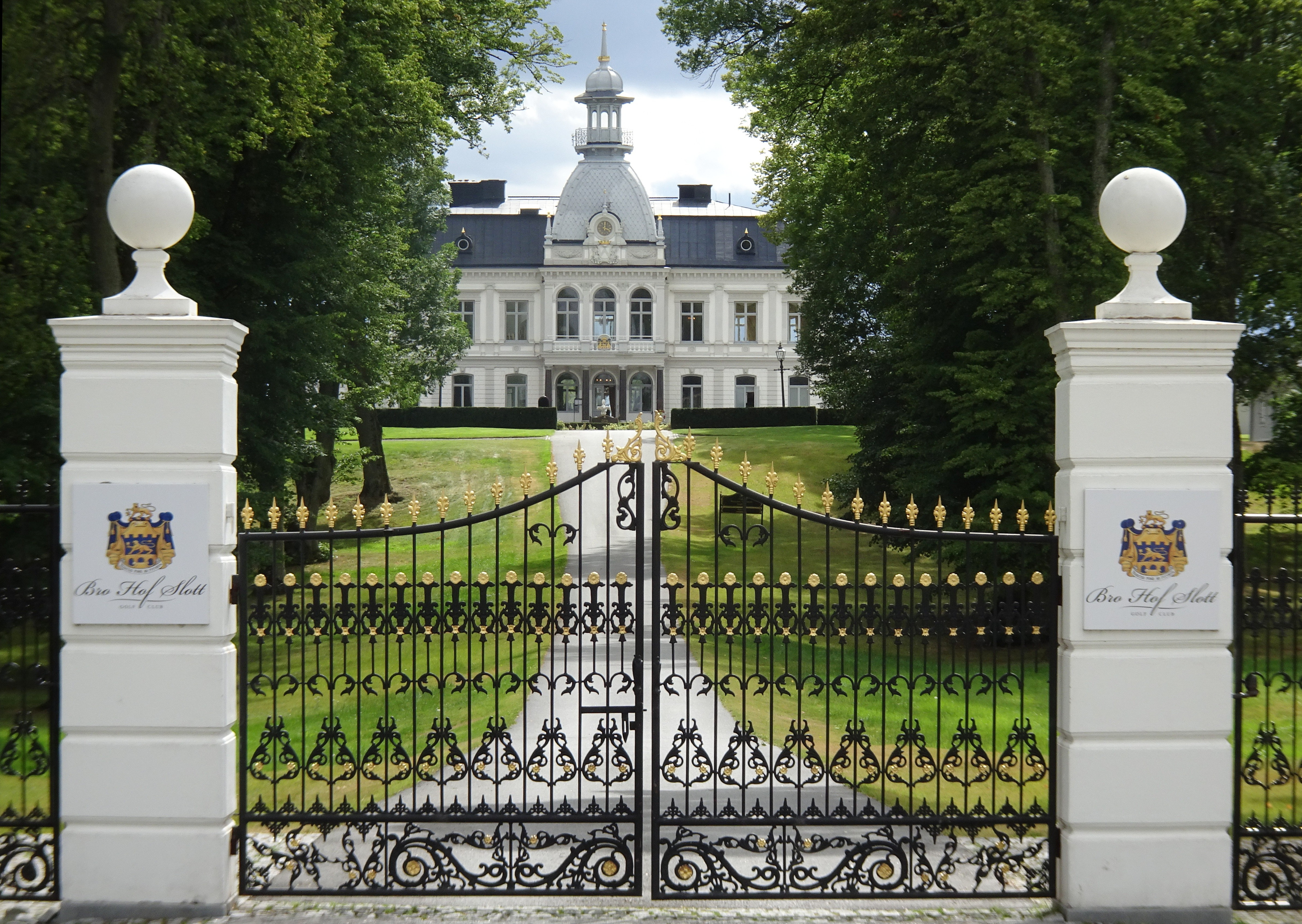 Brogårds grind